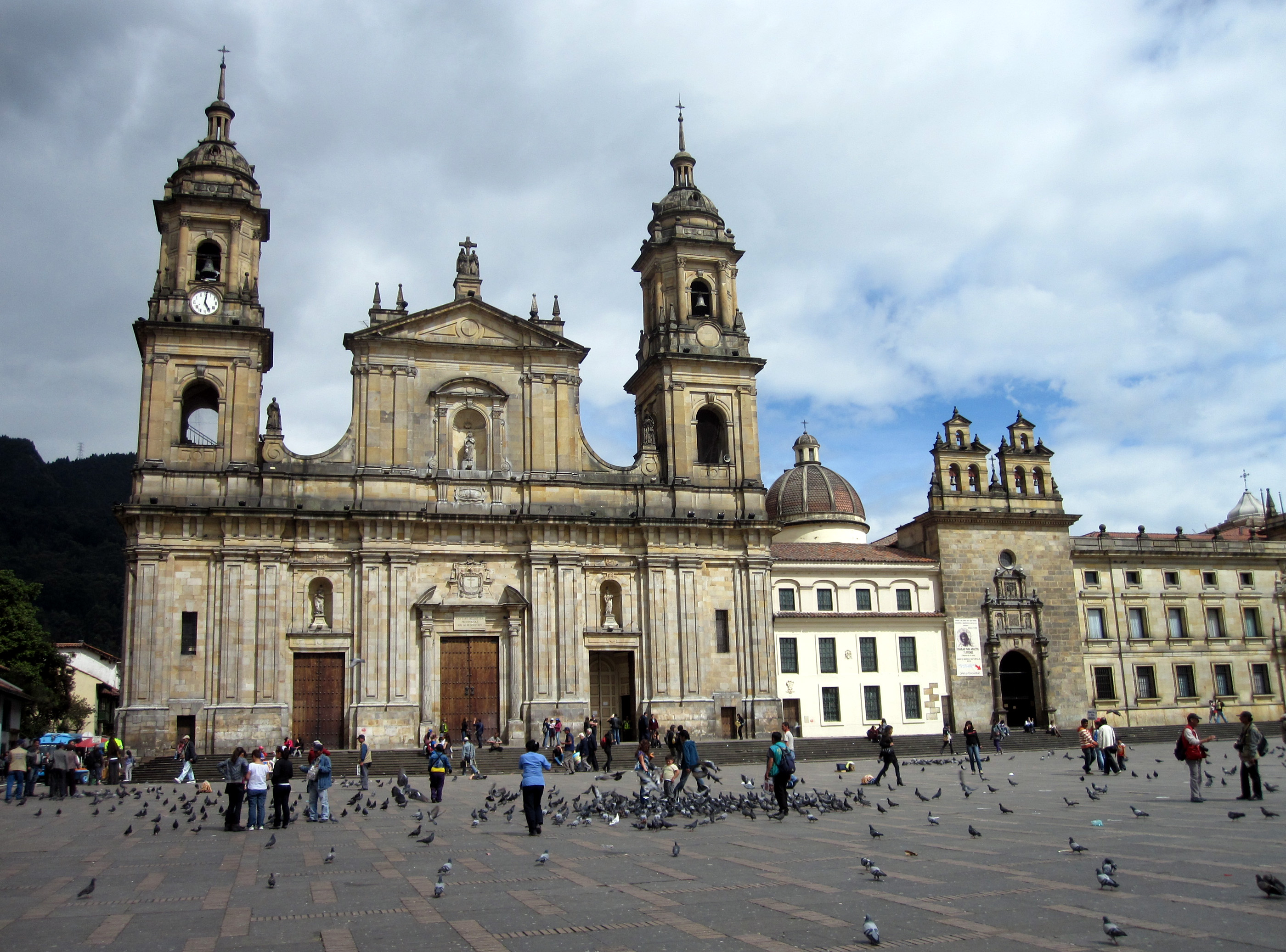 Katedralen i Bogotá